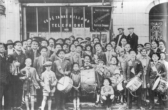 La société bigophonique de Domont.